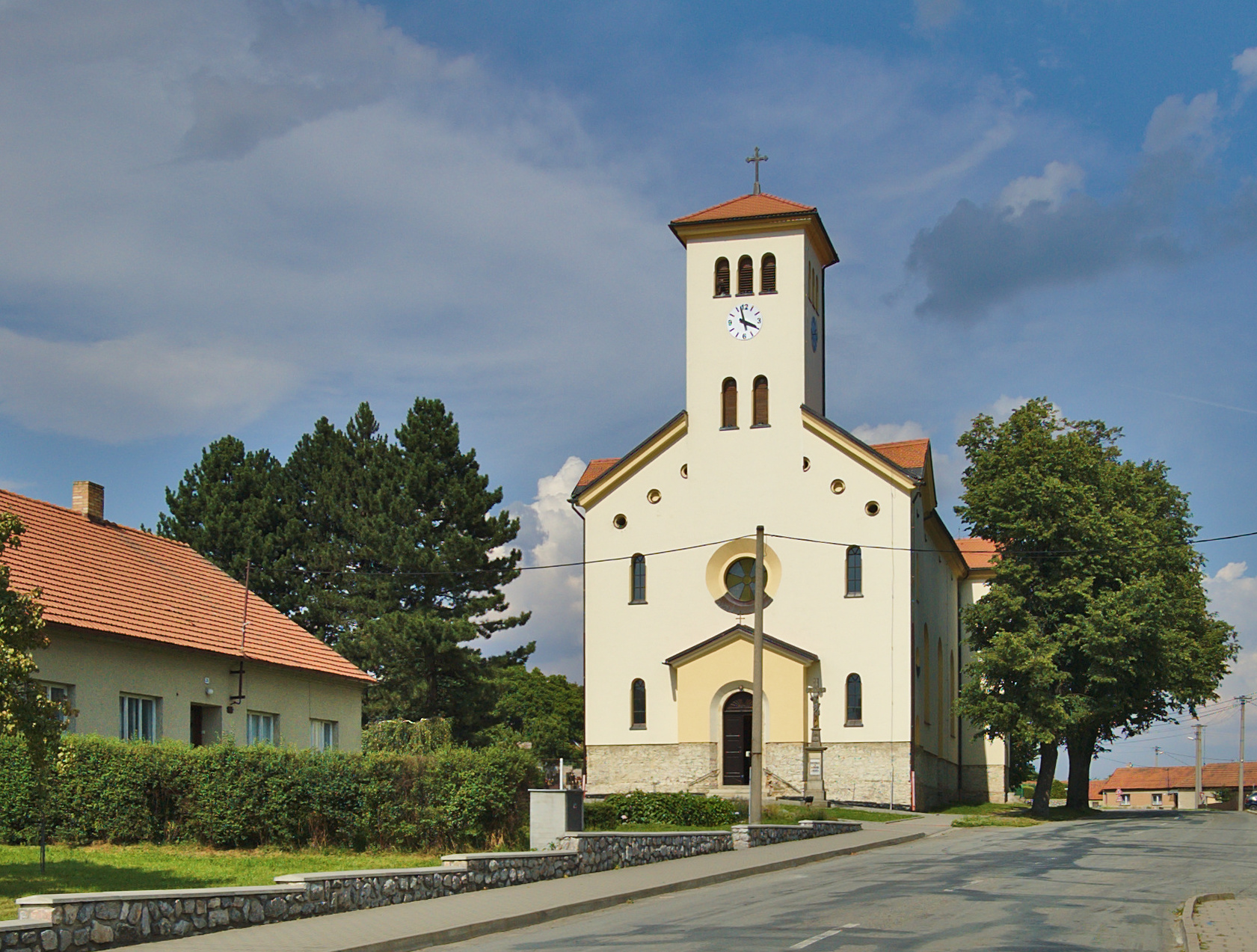 Kostel svatých Cyrila a Metoděje, Molenburk, Vysočany, okres Blansko